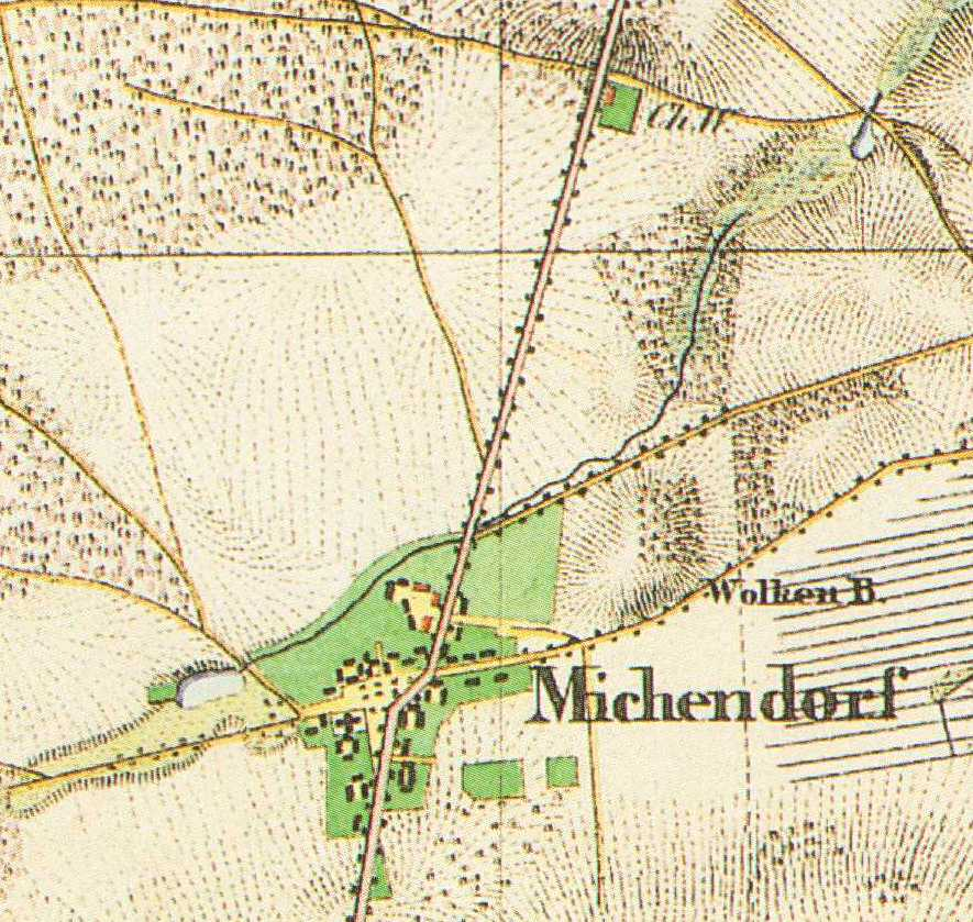 Michendorf, Ortsteil von Michendorf, Lkr. Potsdam-Mittelmark, Brandenburg, Deutschland, Urmesstischblatt BlattPotsdam, 3744, von 1835